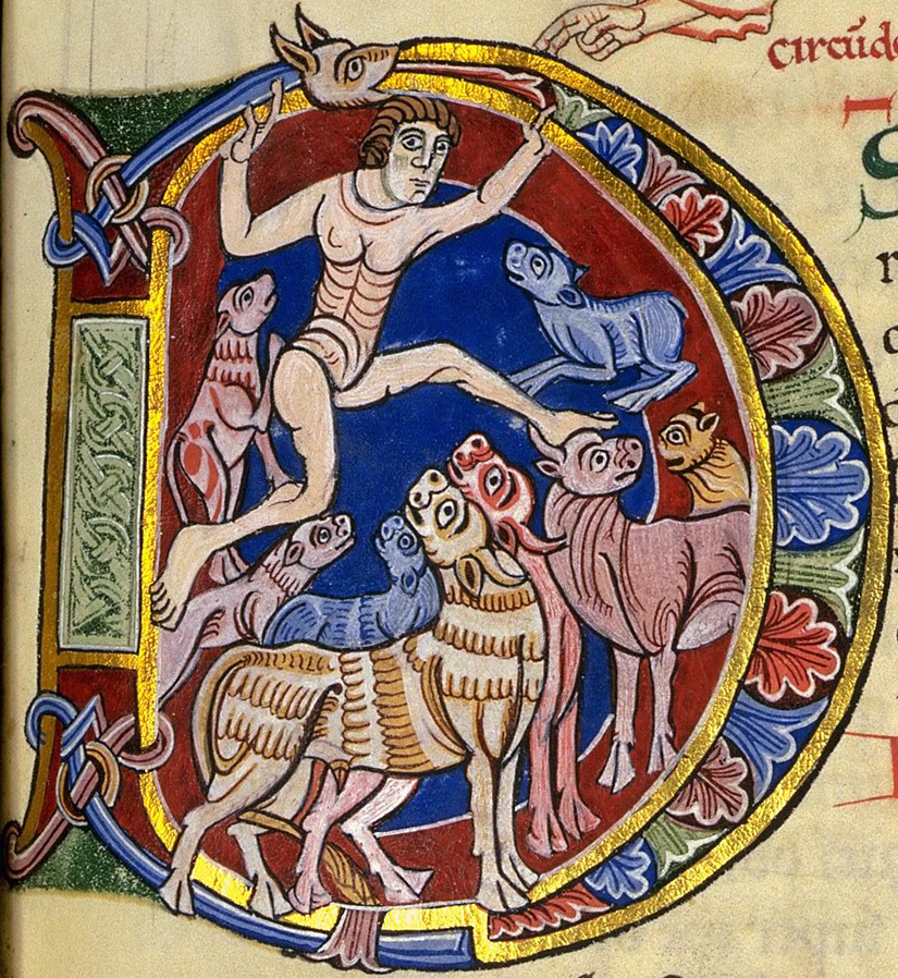 Psalm 22 (Septuaginta / Vulgata: 21), Initial D. In: Albani-Psalter